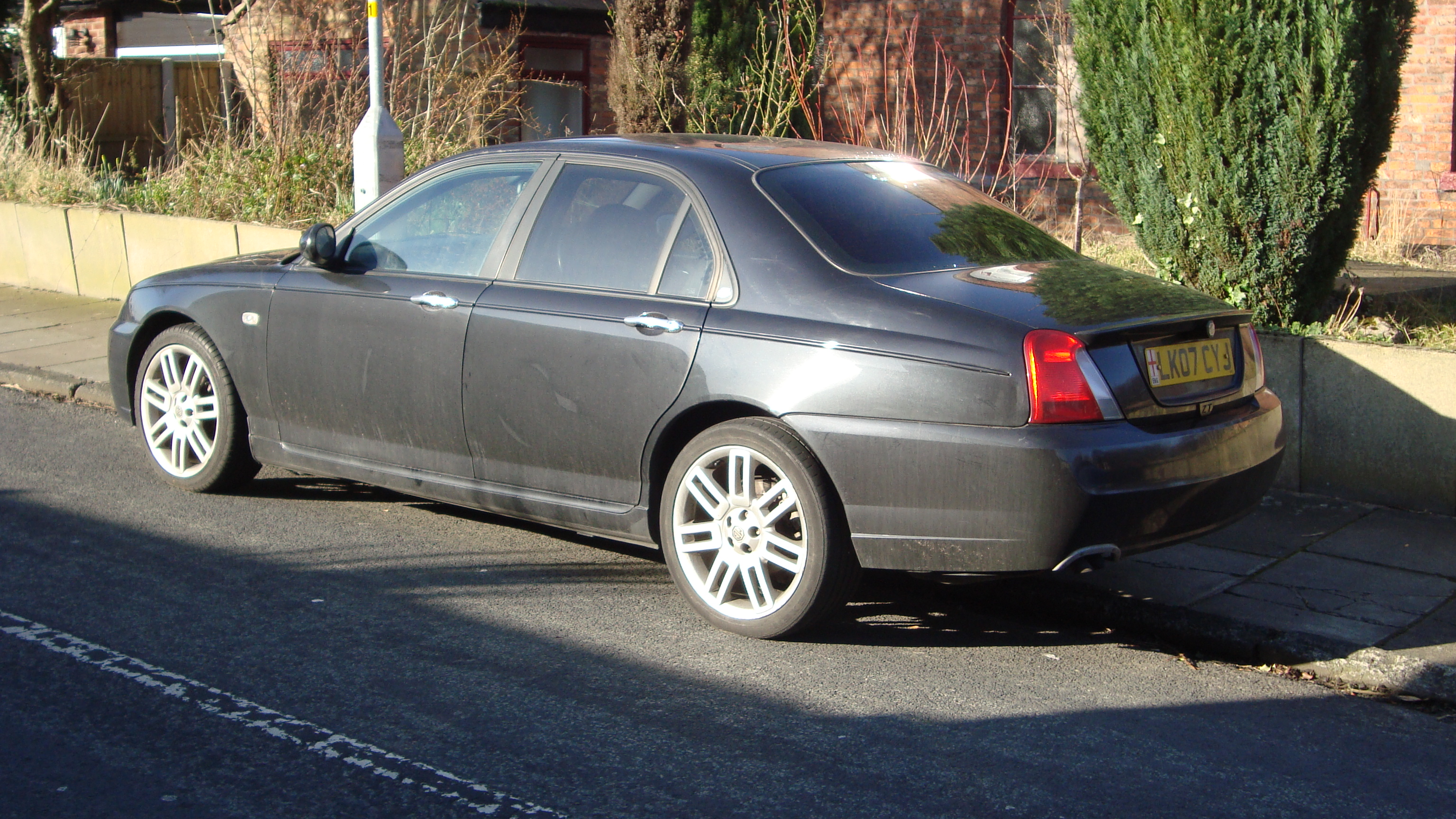 2007 MG ZT CDTI 135